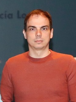 En los Teatros del Canal se ha presentado "El sueño de la vida", con el que Alberto Conejero termina la "Comedia sin título" que Federico García Lorca dejó inacabada en 1936.